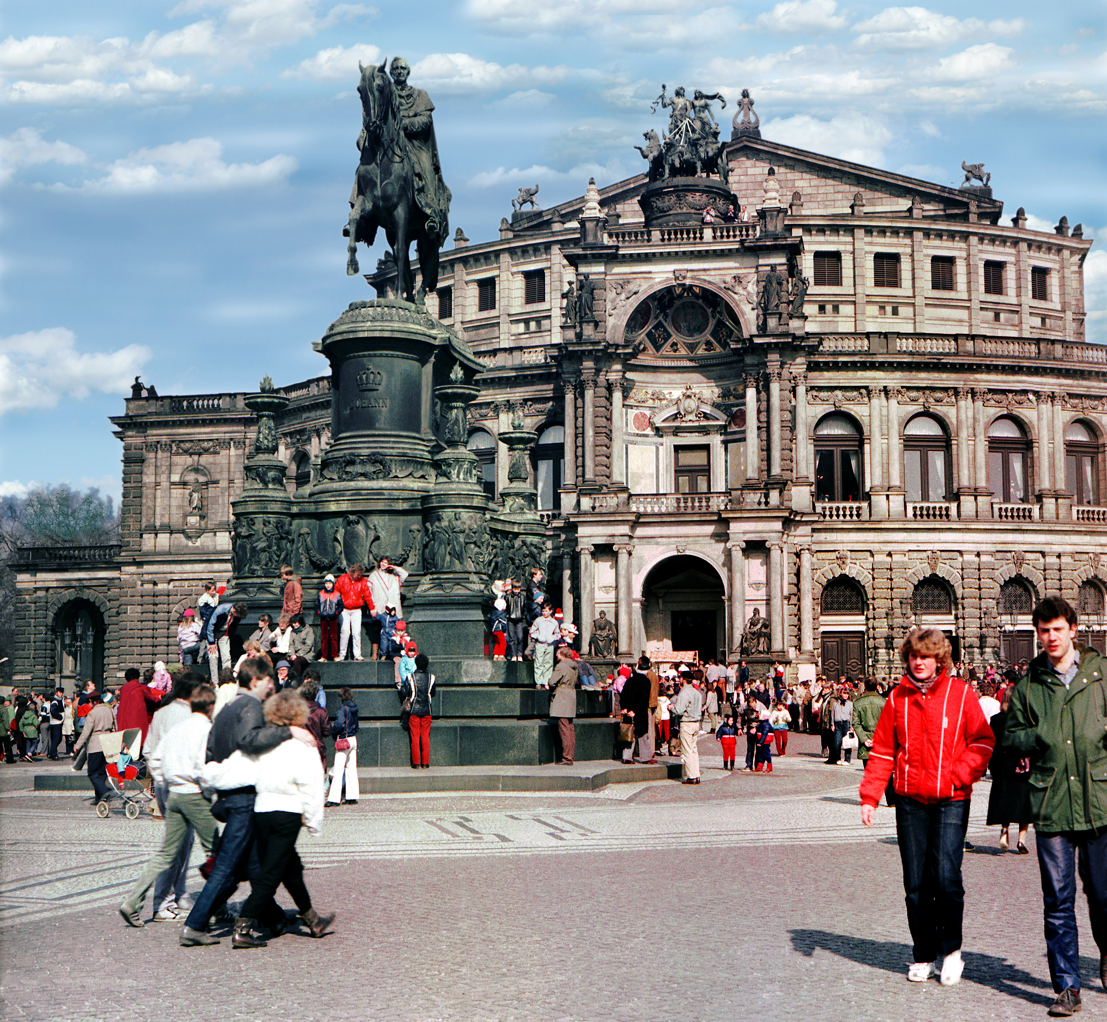 13.04.1986 DDR 8010 [01067] Dresden-Altstadt, Theaterplatz: Die Semperoper am "Tag der offenen Tür". Erbaut von 1871-1878 nach Entwurf von Gottfried Semper im Stile der italienischen Hochrenaissance, ausgeführt von seinem Sohn Manfred Semper. In der Bombennacht vom 13. zum 14.02.1945 ausgebrannt. Wiederaufbau 1977-1985 (GMP: 51.054445,13.735211). Vorn links das Reiterstandbild (GMP: 51.053852,13.735897) König Johann von Sachsen (1889 von Johannes Schilling). [R19860413B0005.TIF]19860413740NR.JPG(c)Blobelt